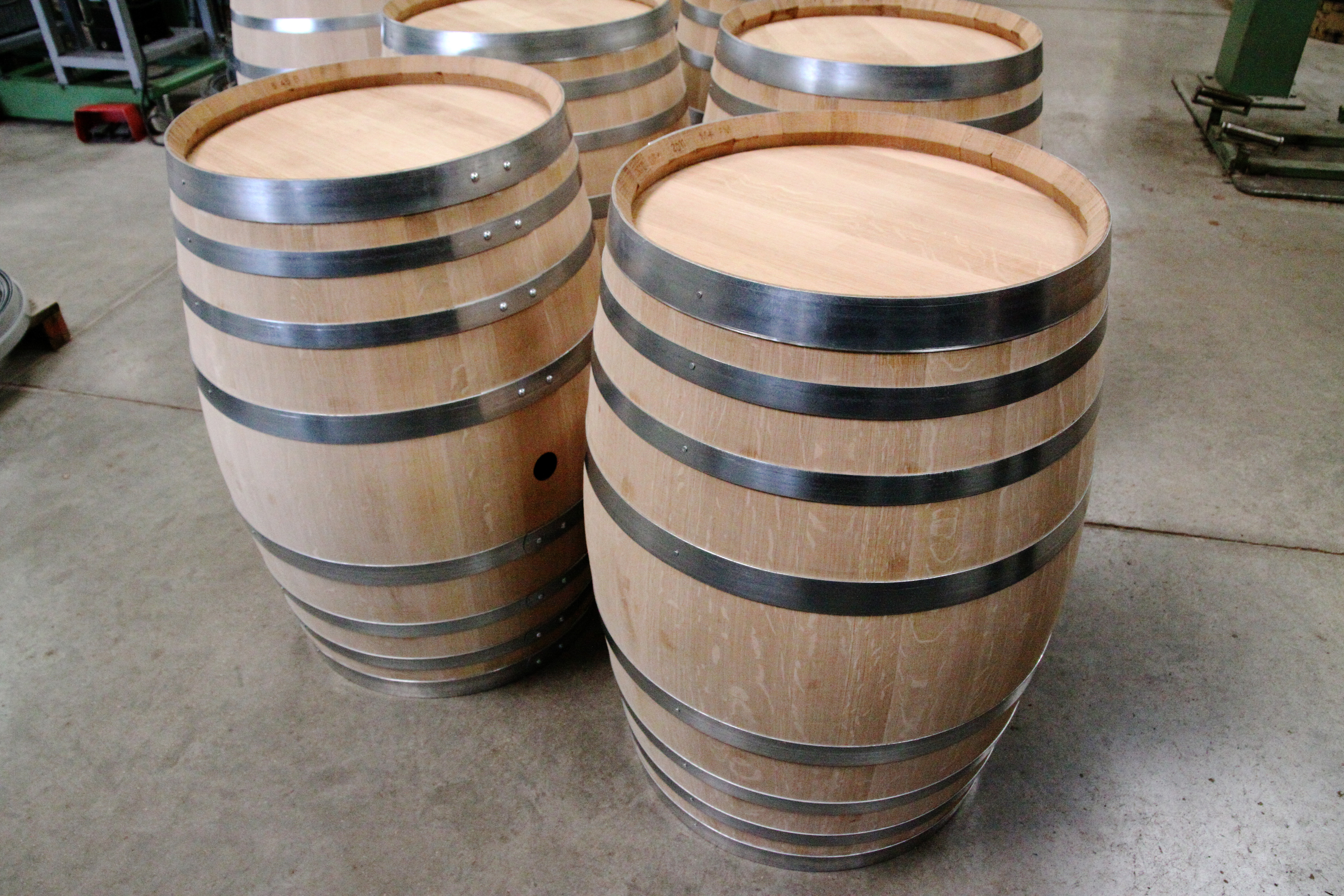 Tonneaux neufs en attente de vérifications